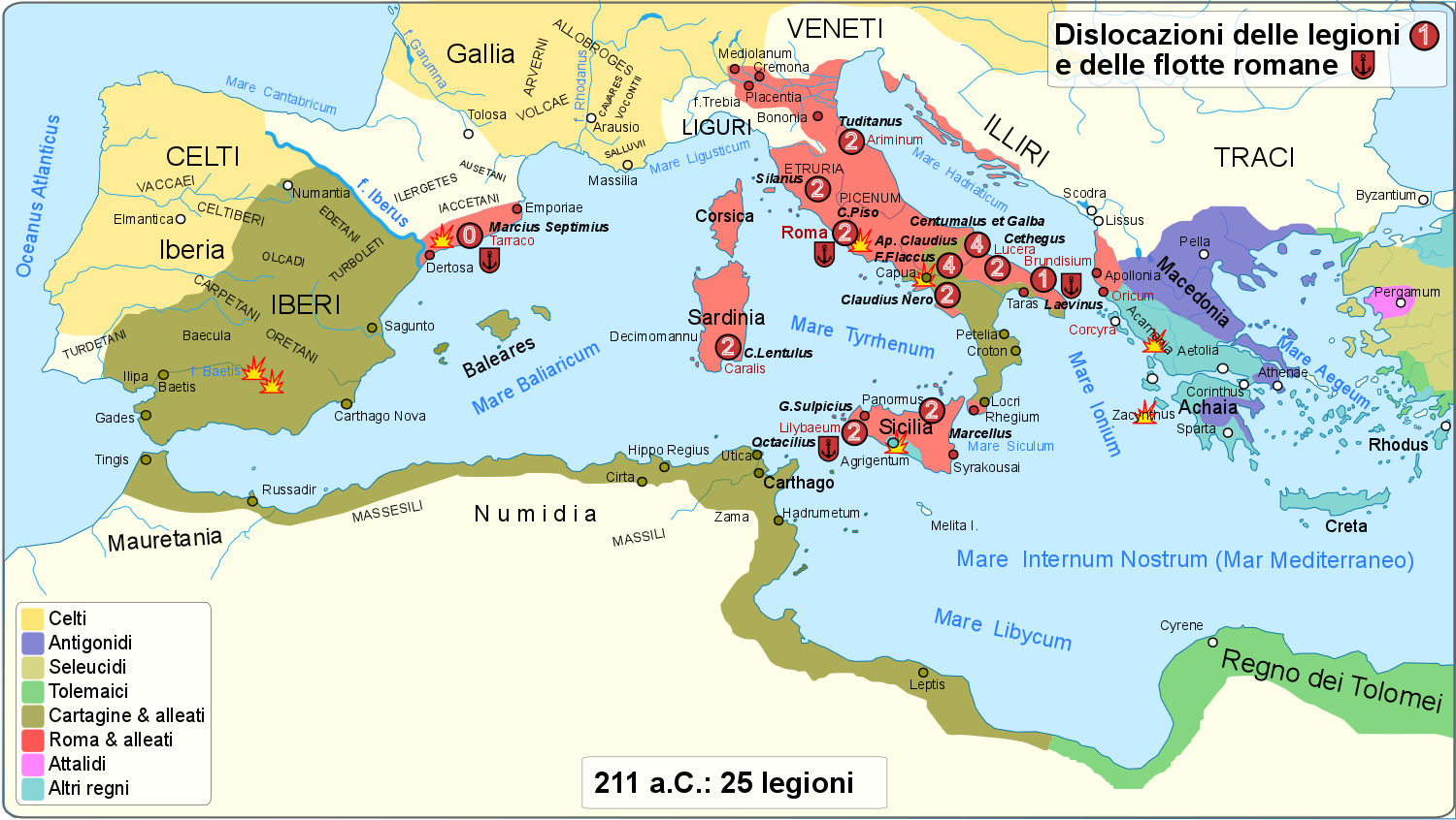 Dislocazione e dimensione delle armate romane nel 211 a.C. durante la seconda guerra punica